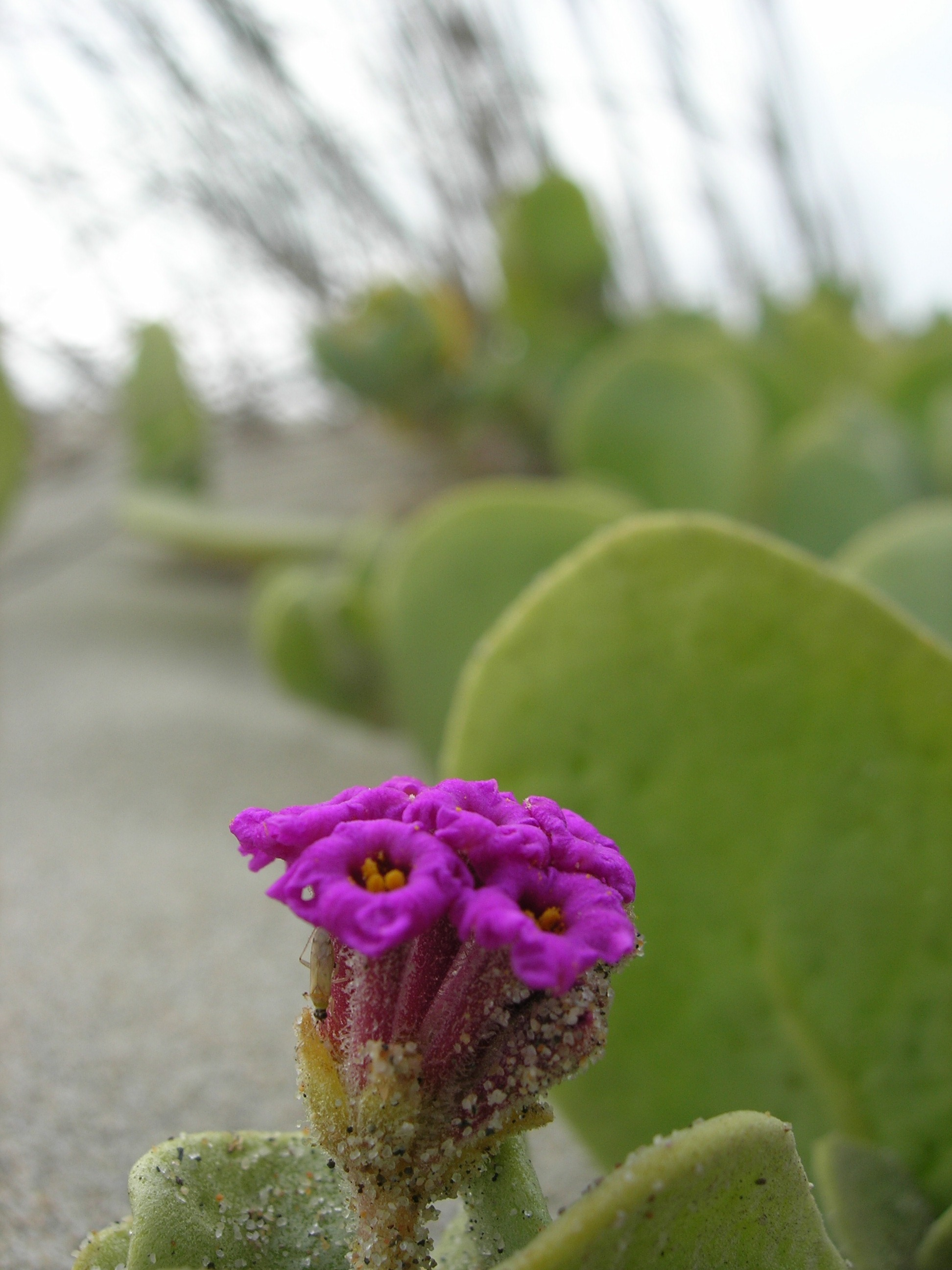 Abronia maritima (red sand-verbena)